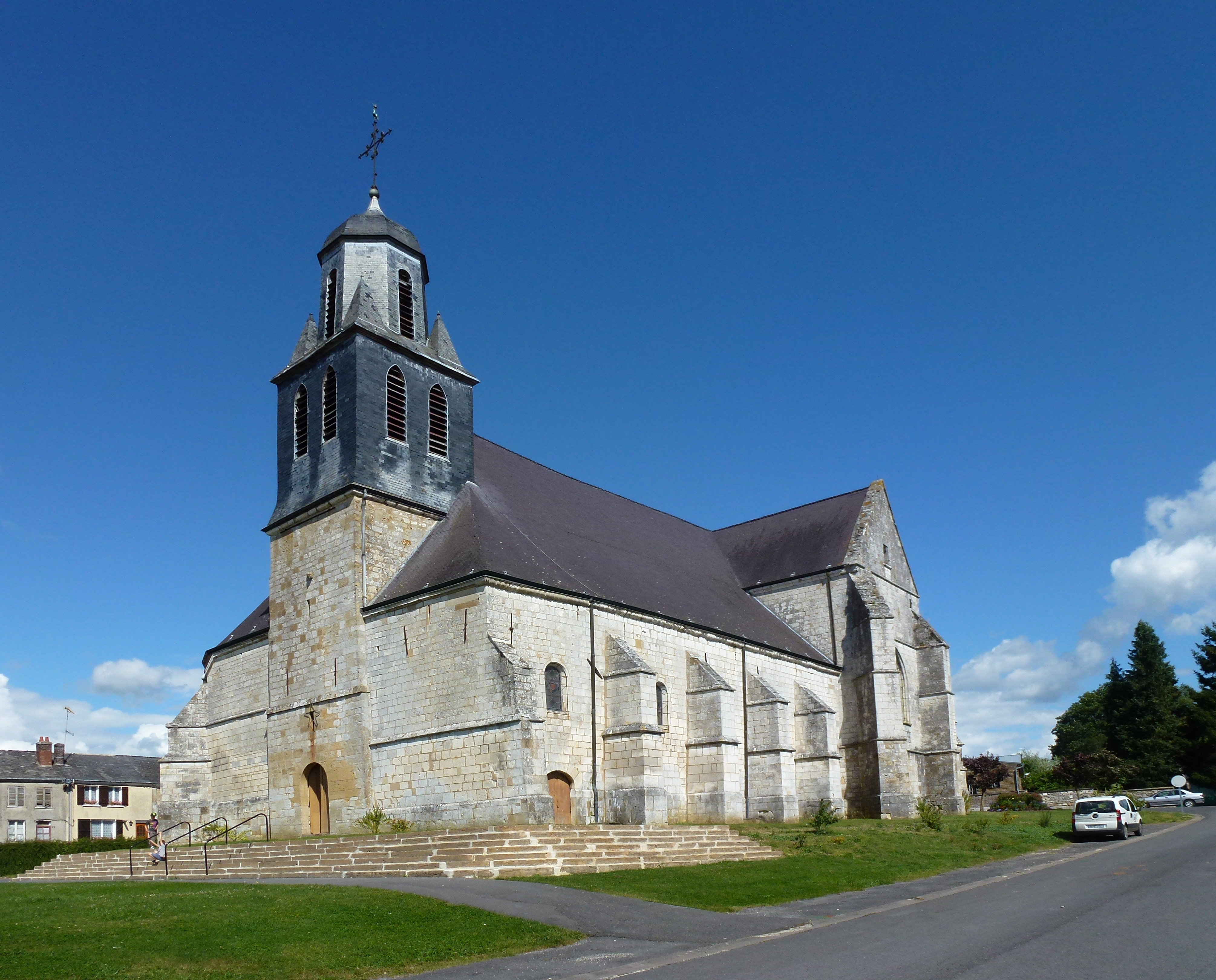 Launois-sur-Vence (Ardennes) église Saint-Etienne. Construction: 12e siècle; 13e siècle; 15e siècle; 16e siècle.